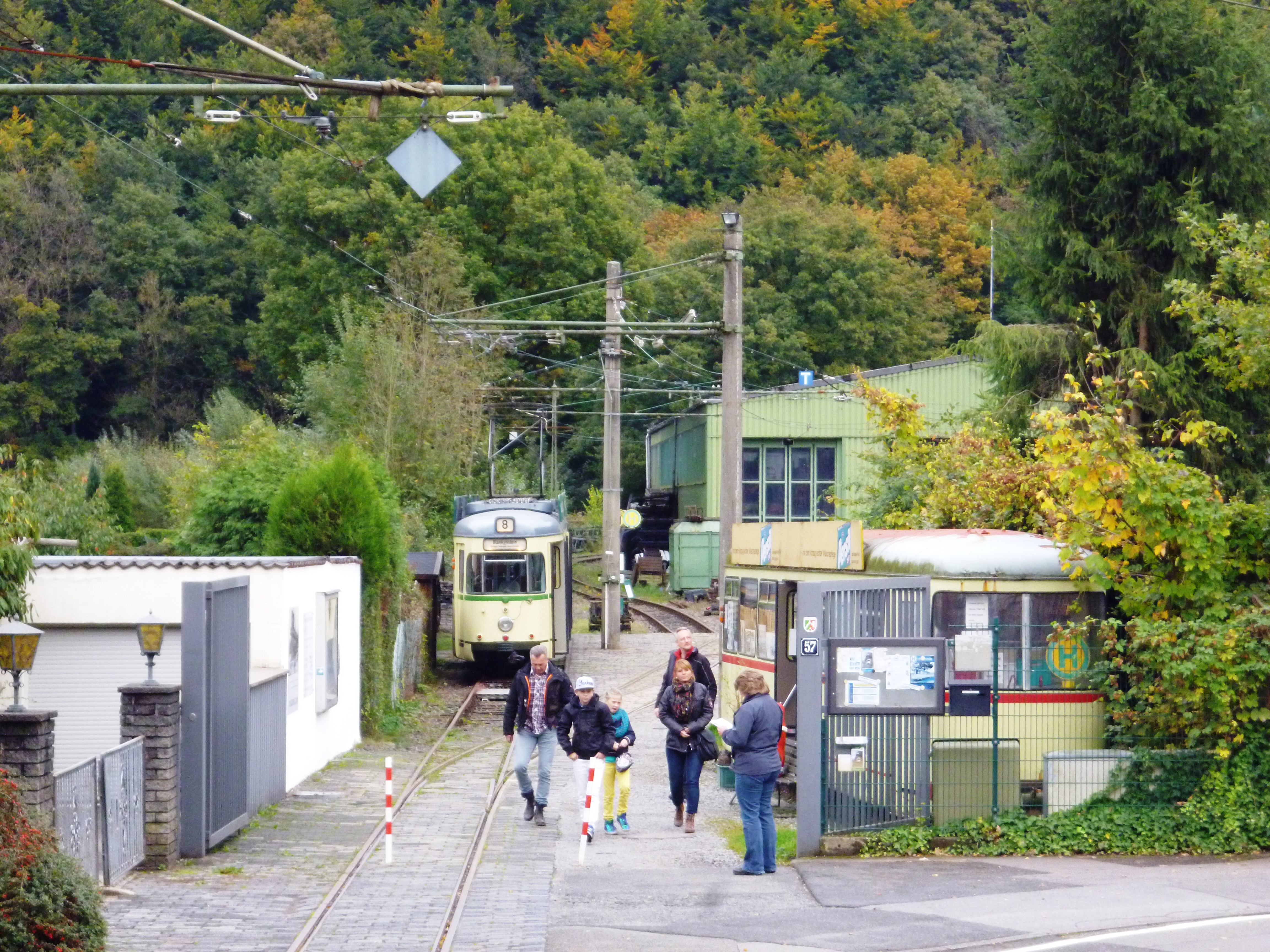 Eingang des Straßenbahnmuseums in Wuppertal Kolfurt